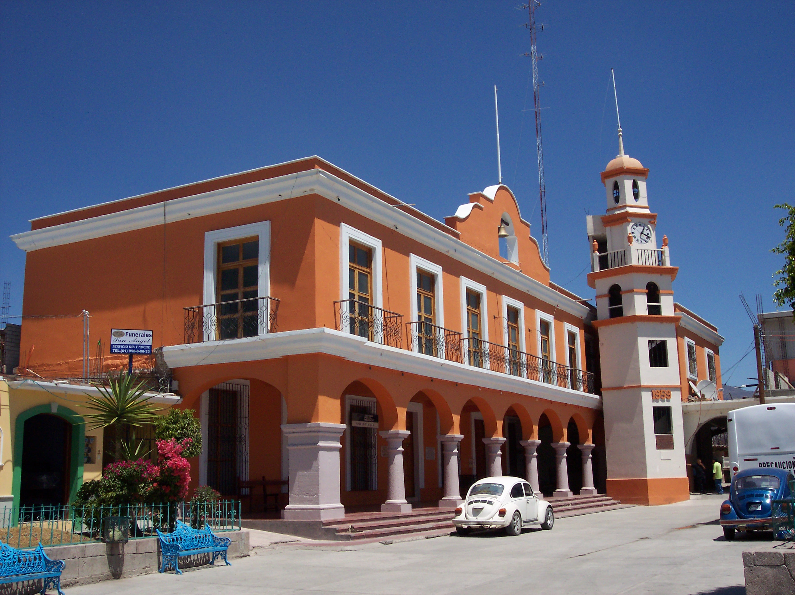 Municipal Palace of San Pablo Villa de Mitla SPANISH: Palacio Municipal Located in: San Pablo Villa de Mitla, Oaxaca, Mexico.